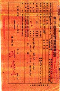 japan emigrant in Taiwan zn:日本移民村